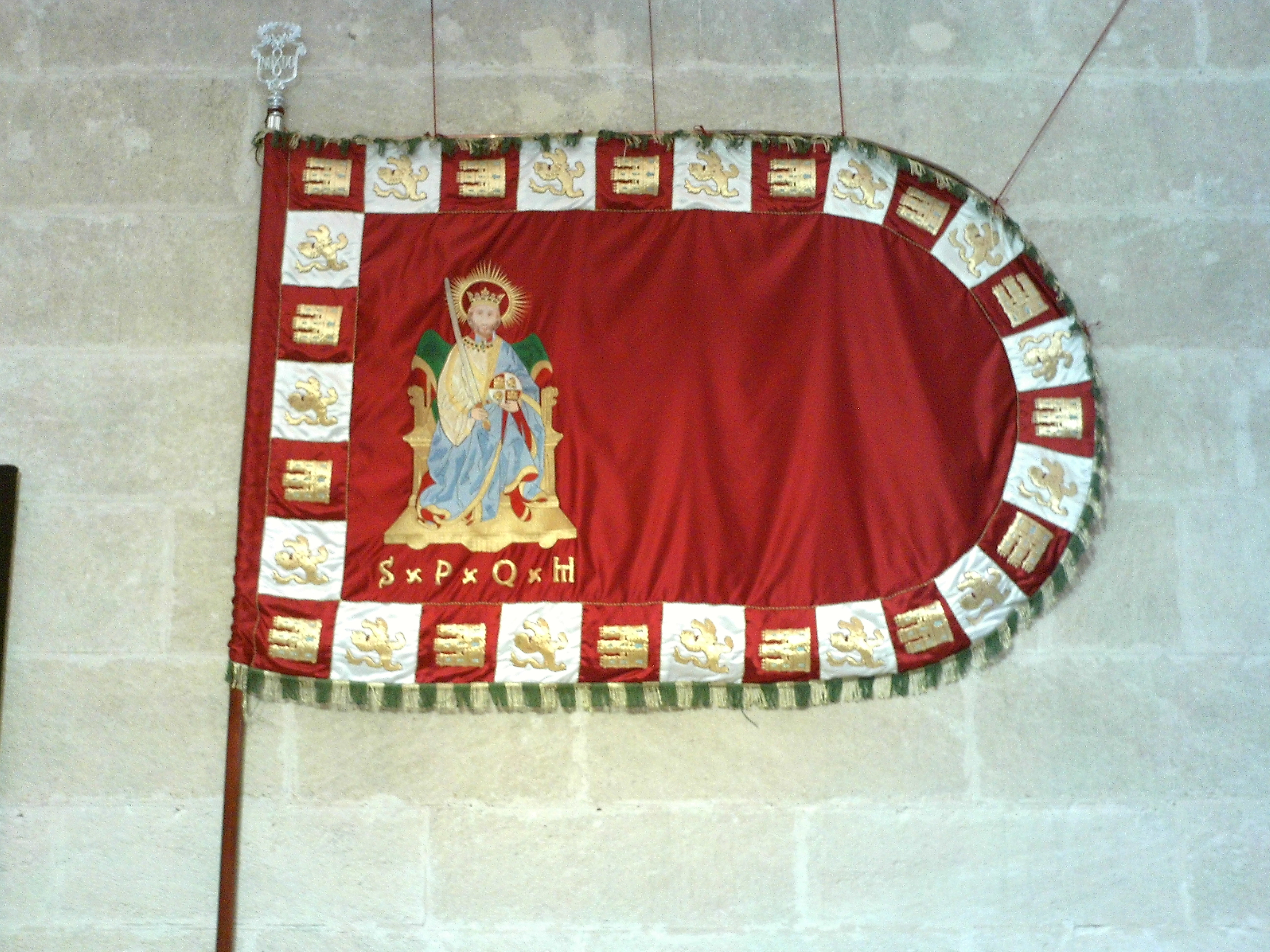 Pendón de la ciudad de Sevilla. Exposición en la casa consistorial. Sevilla, Andalucía, España.